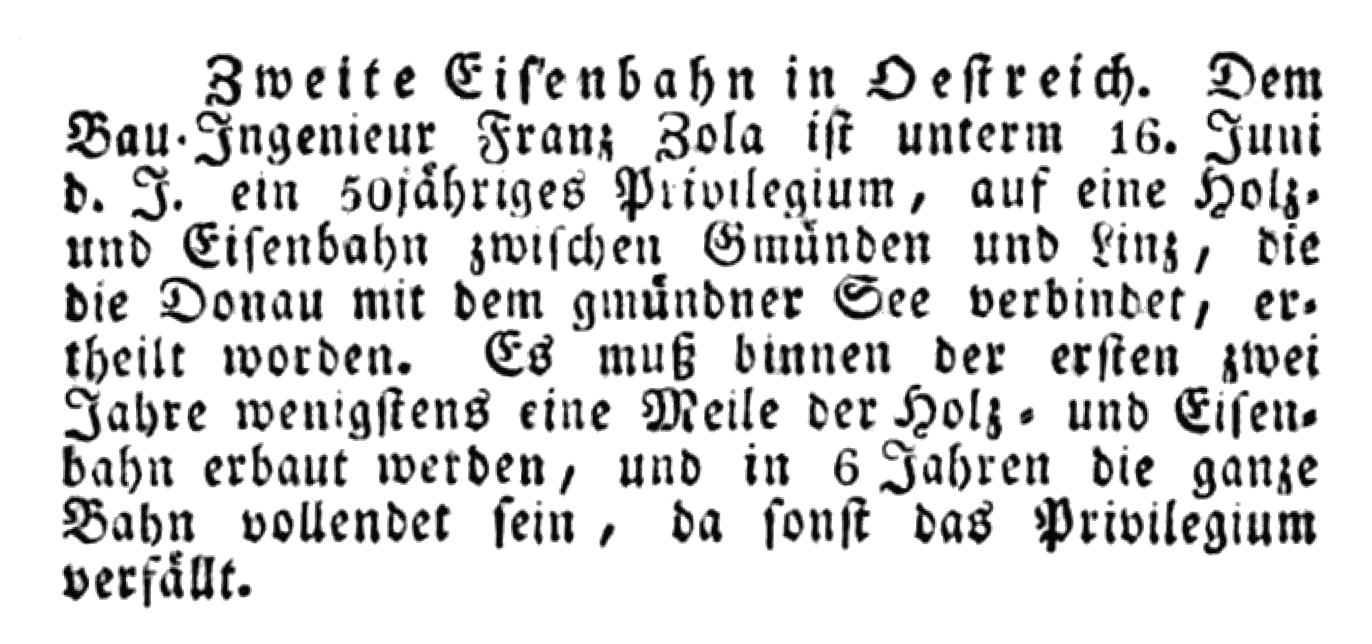 Zweite Eisenbahn in Oestreich